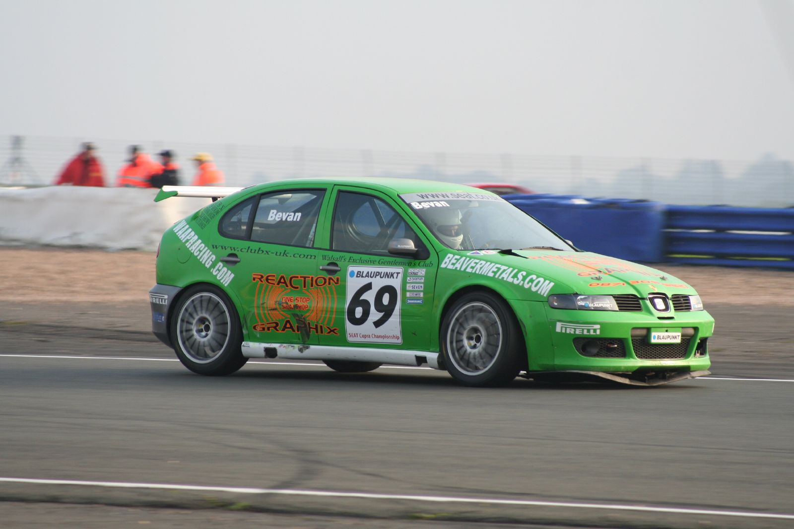 Bevan vs Breeze